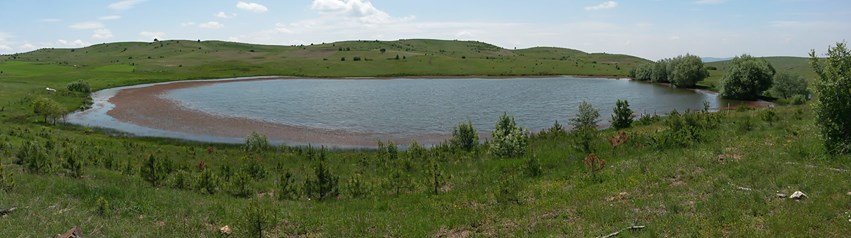 boğazkale sarıçiçek köyü gölü